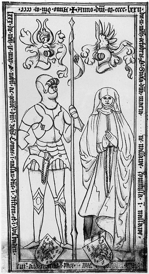 Tekening van het grafmonument voor Johann van Nassau-Wiesbaden en Maria van Nassau-Breda